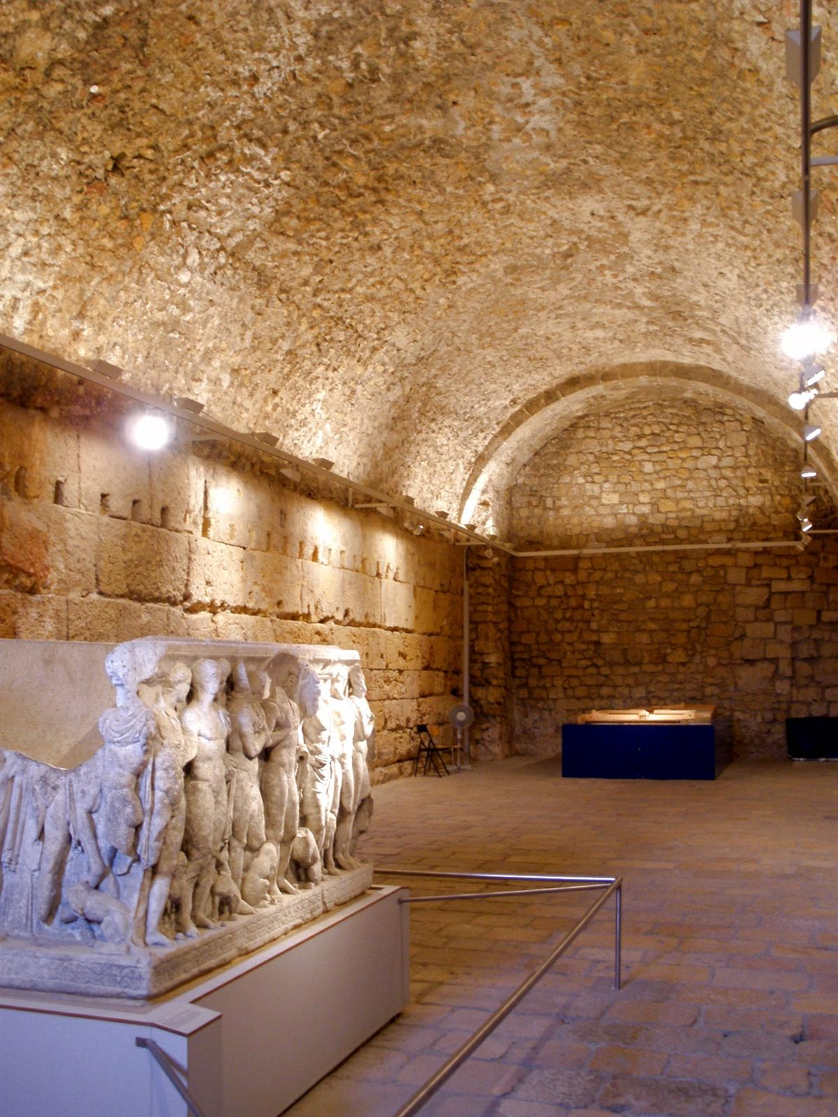 Circo romano de Tarraco (Tarragona)